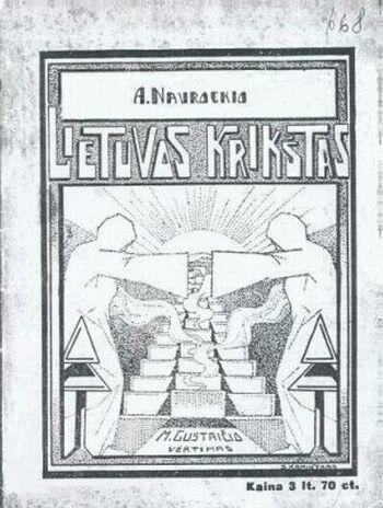 The cover of book A. A. Navrockij. Lietuvos Krikštas. Eilėtinė penkių veiksmų drama. M. Gustaičio vertimas iš rusų kalbos. Kaunas-Marijampolė: „Dirvos“ bendrovė, 1927. Scan by Alma Pater.